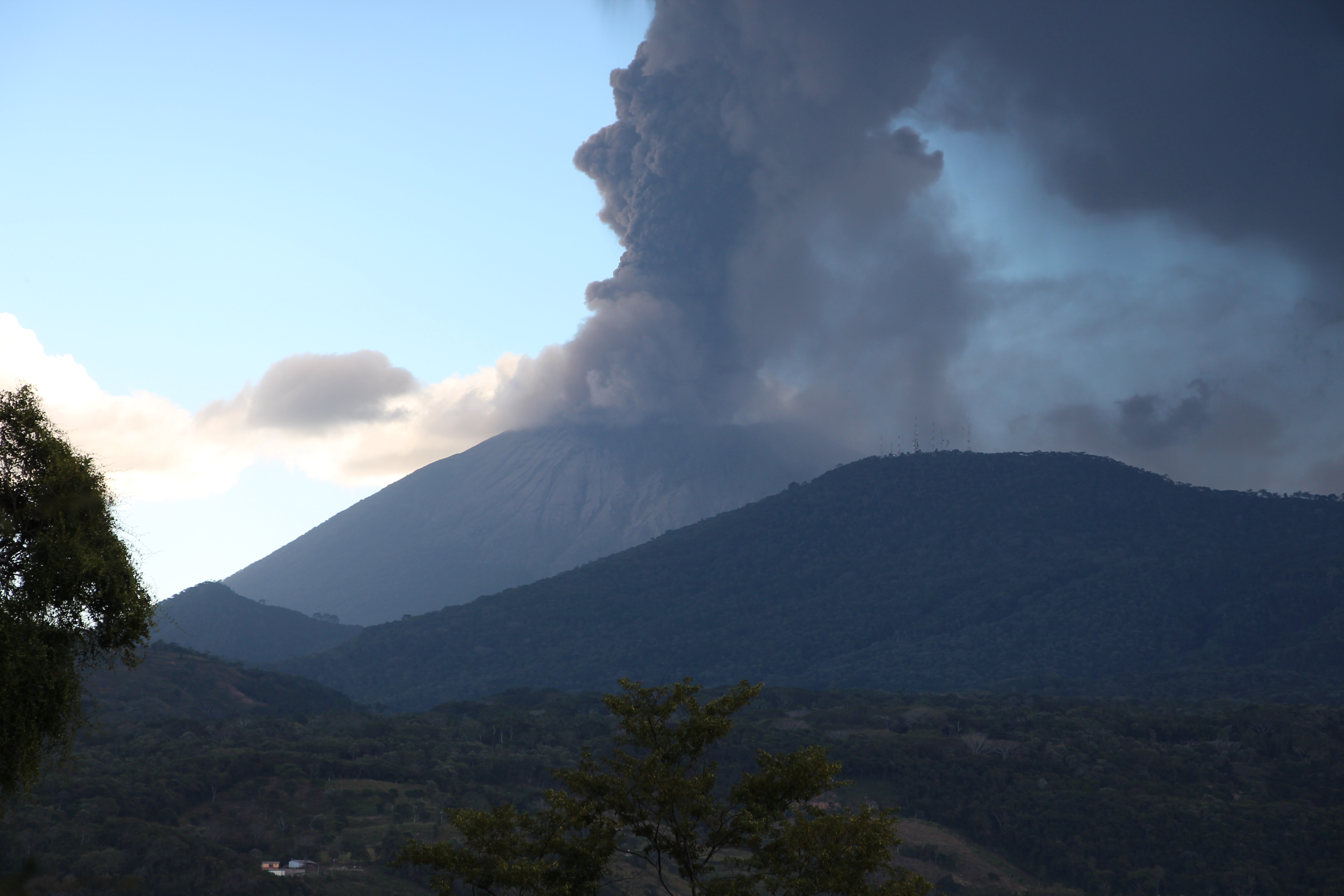 Vulkan Chaparrastique, El Salvador aktiv Ende 2013